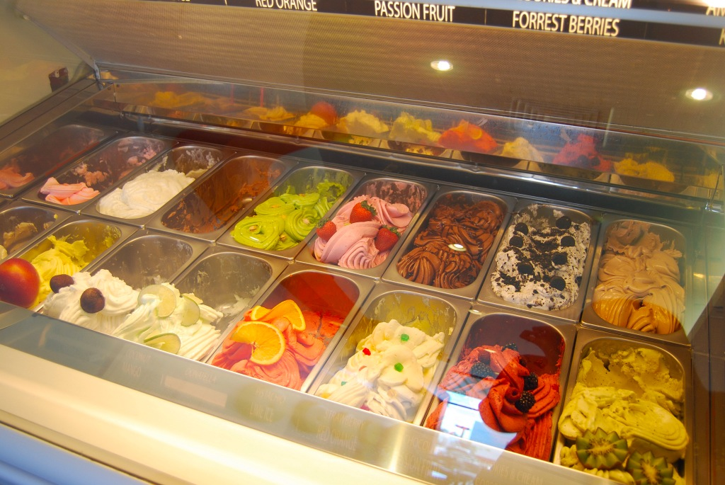 gelato